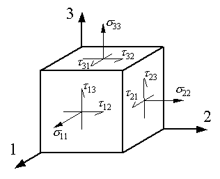 Spannungen an einem Materialwürfel in der Ingenieursnotation